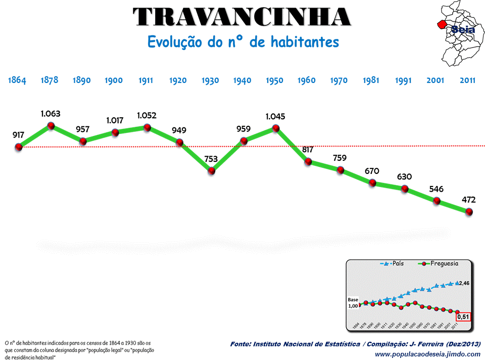 Evolução da População 1864 / 2011